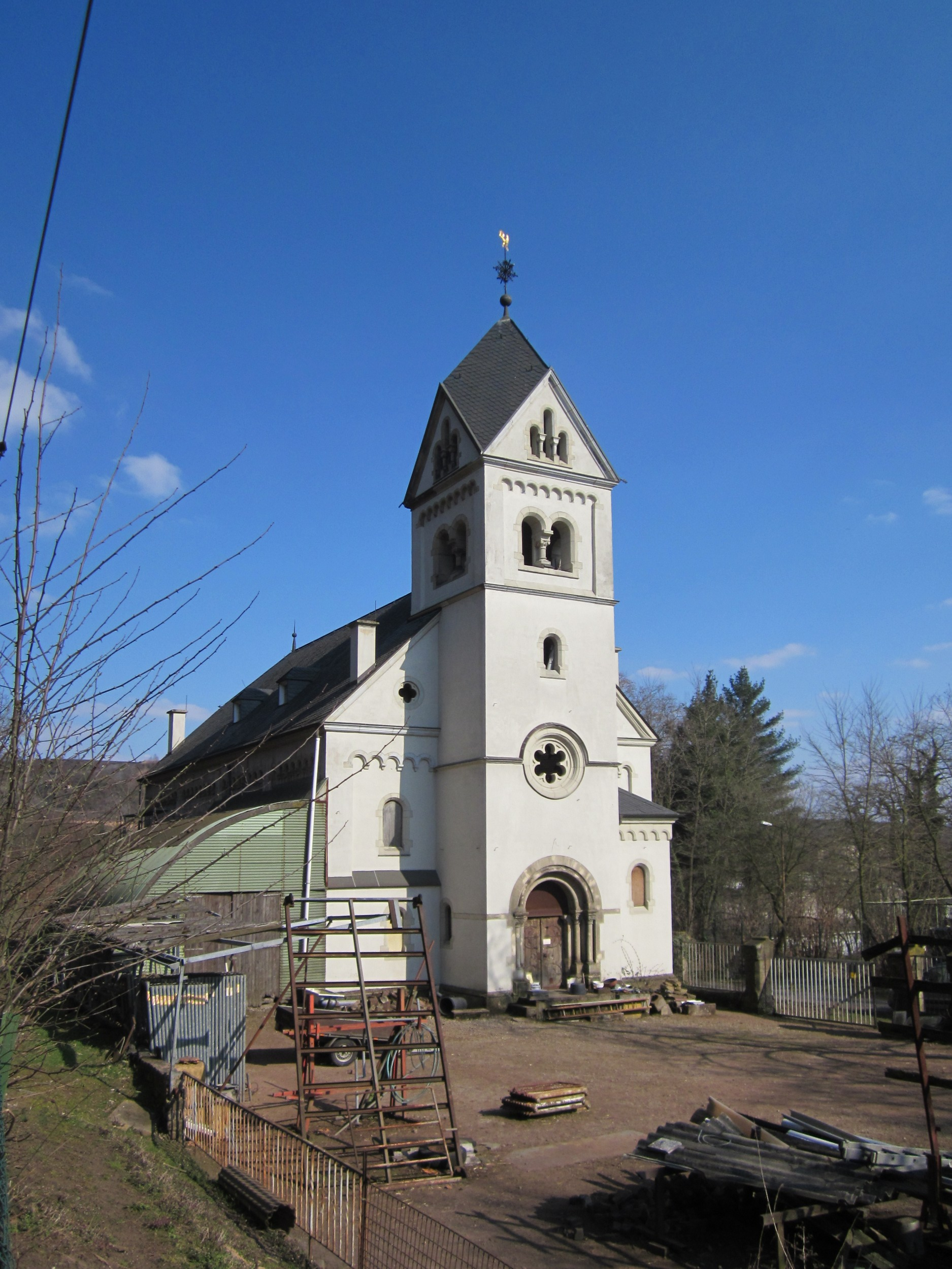 Stummsche Kapelle am Halberg (Saarbrücken)